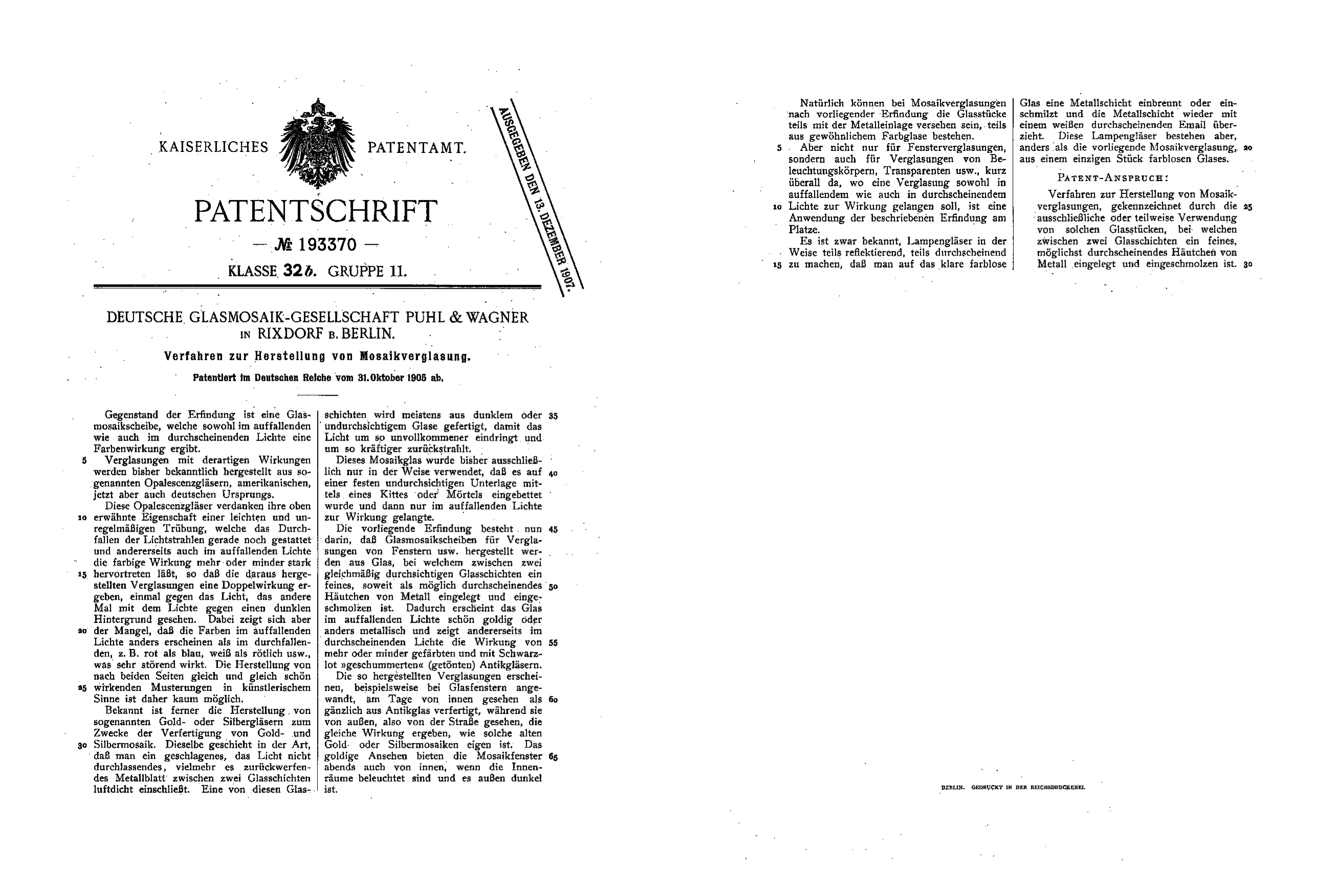 Patentschrift Nr. 193370, Klasse, 32b Gruppe 11 für das Verfahren zur Herstellung von Mosaikverglasung